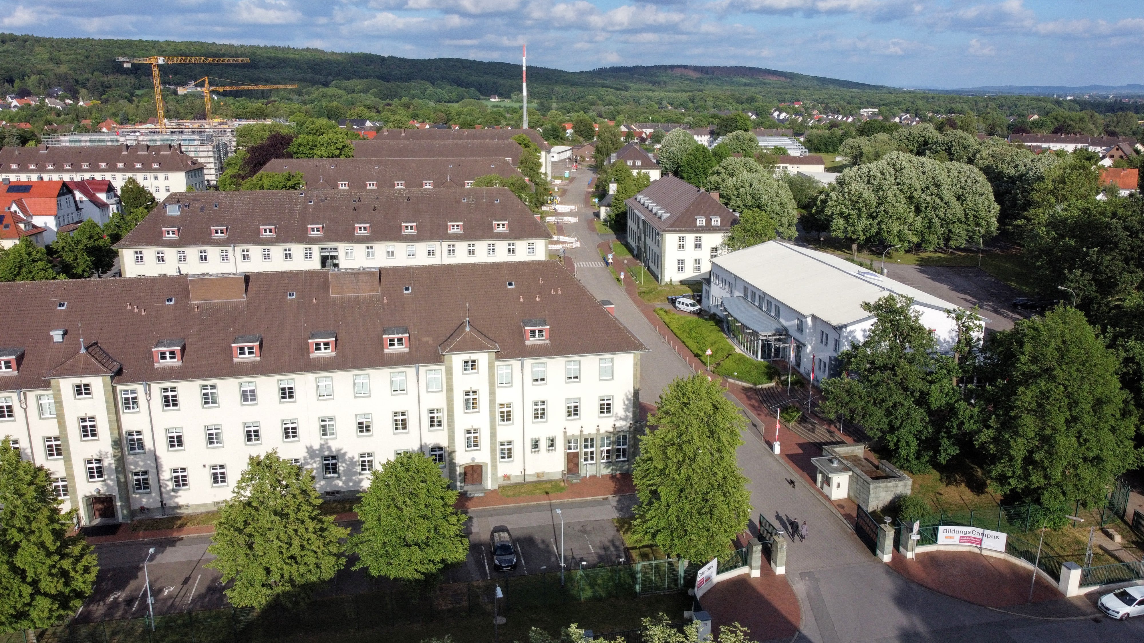 BildungsCampus Herford Luftbild